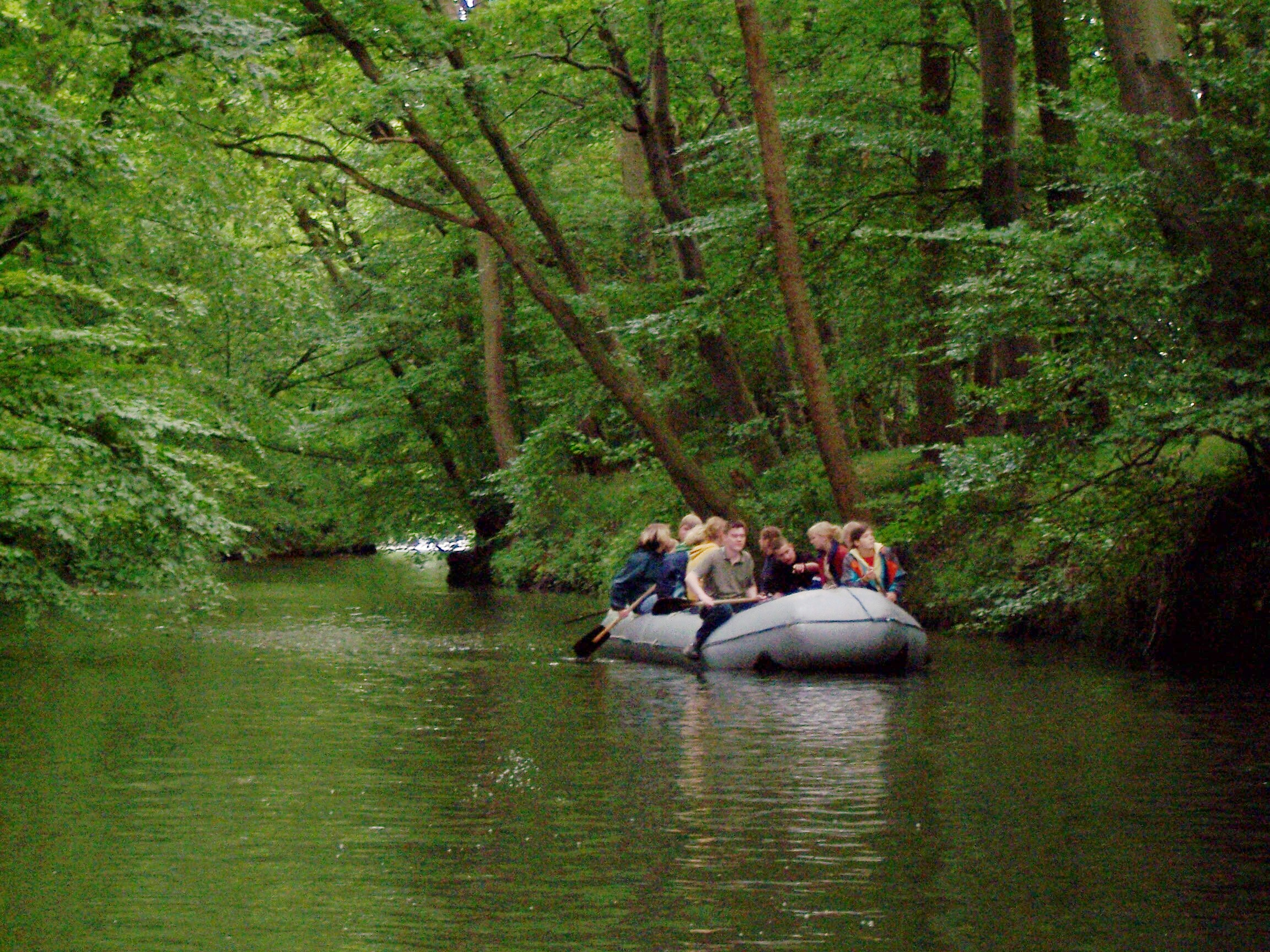 Mit dem Boot den naturbelassenen Fluss Hase entlang - Beliebte Freizeitbeschäftigung in Rieste